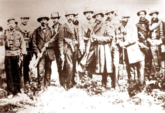 Representación histórica de 1920 del grupo de civiles bolivianos que encabezaron la resistencia en Calama el 23 de marzo de 1879, al centro izq. con rifle en ristre Severino Zapata, al centro con revolver en mano, Eduardo Abaroa, centro der., coronel Ladislao Cabrera